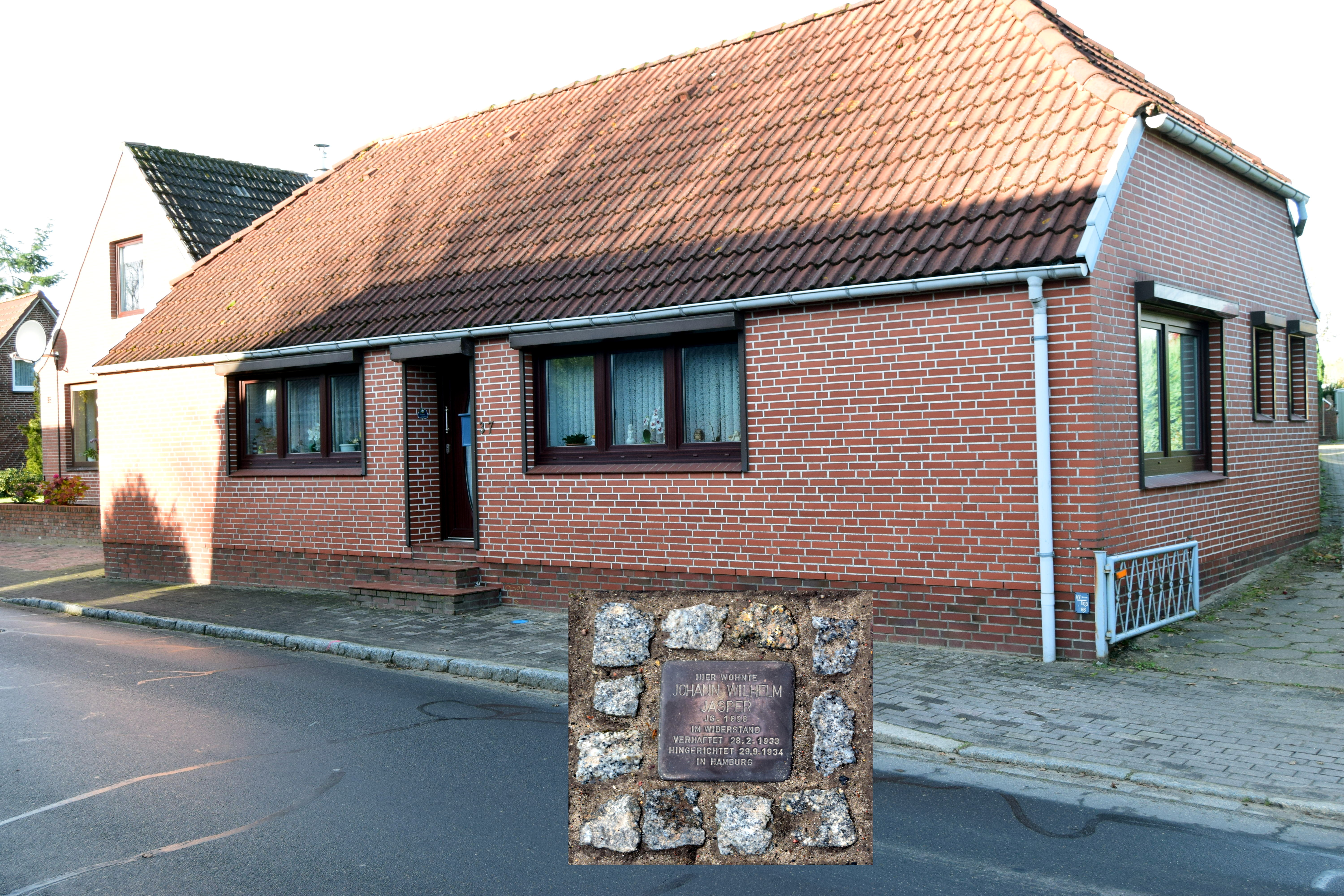 Der Stolperstein Johann Willi Jasper, Marschstraße 37, Meldorf vor dem Haus